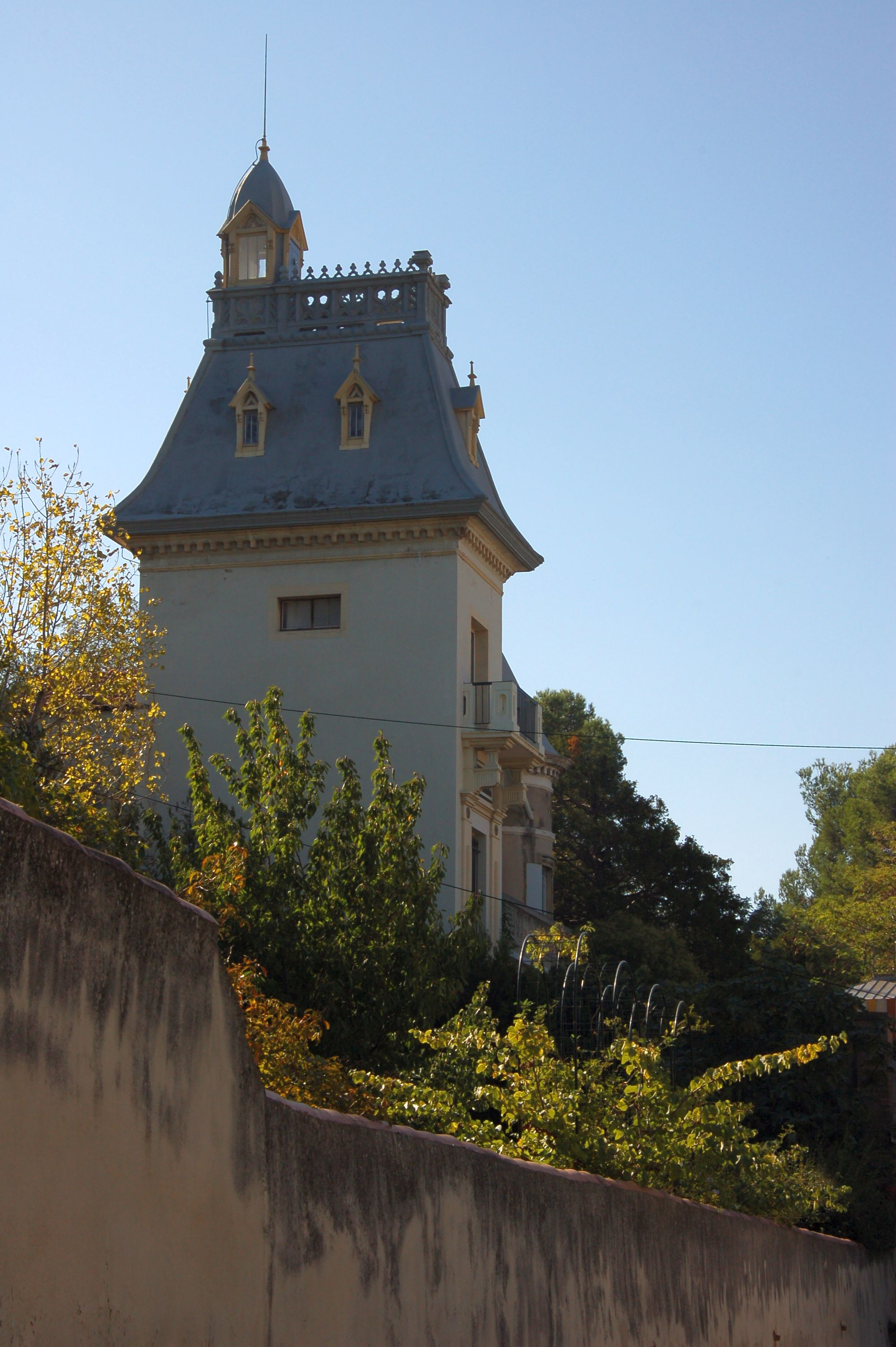 La résidence Magenta (aussi appelé Château Magenta) se situe à la Traverse Montcault, dans le quartier Saint-Just (13e arrondissement) et en bordure du quartier de Saint-Barthélemy (14e arrondissement), à Marseille.